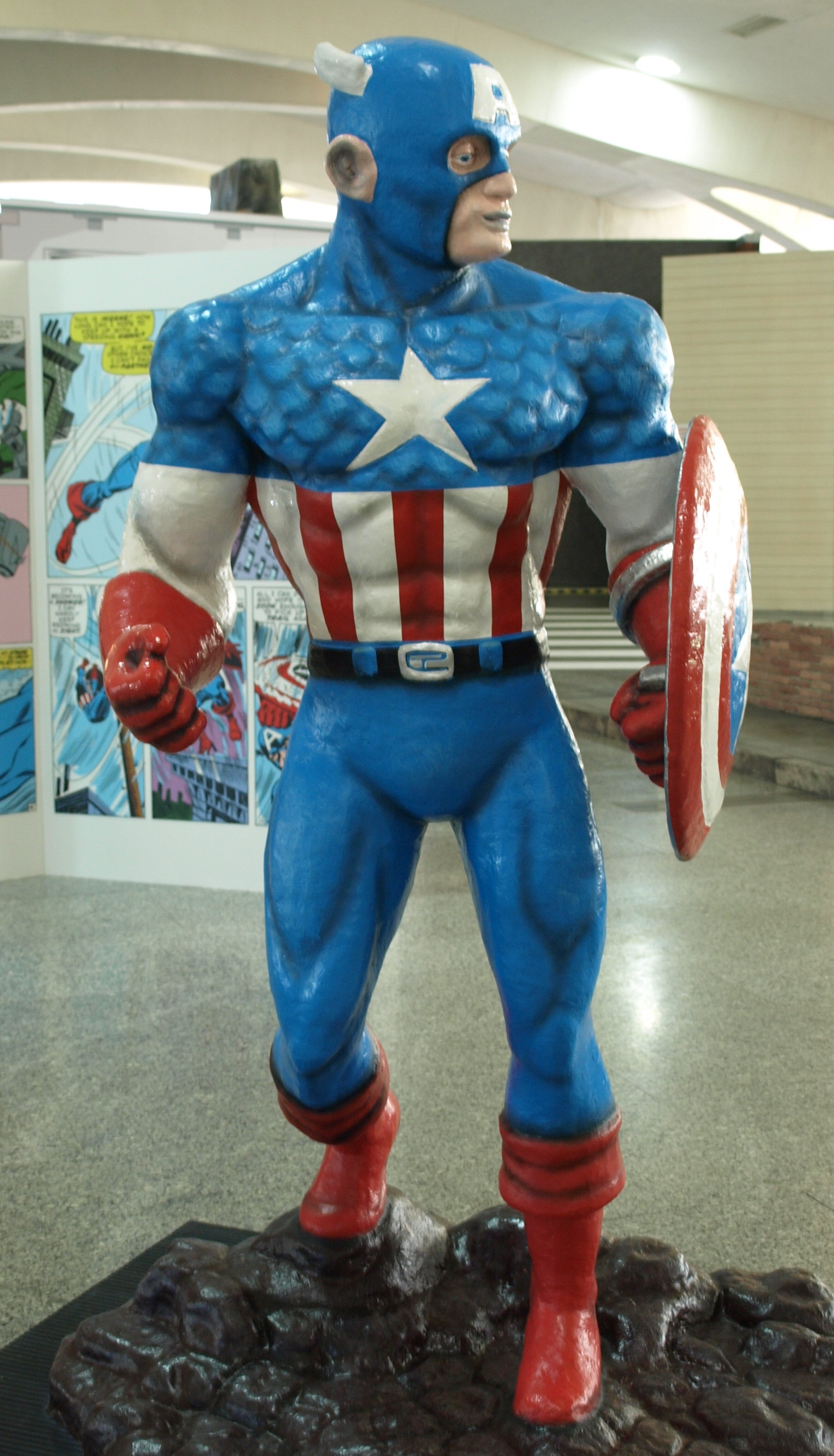 Estatua de cartón-piedra del Capitán América en el museo Principe Felipe de Valencia.